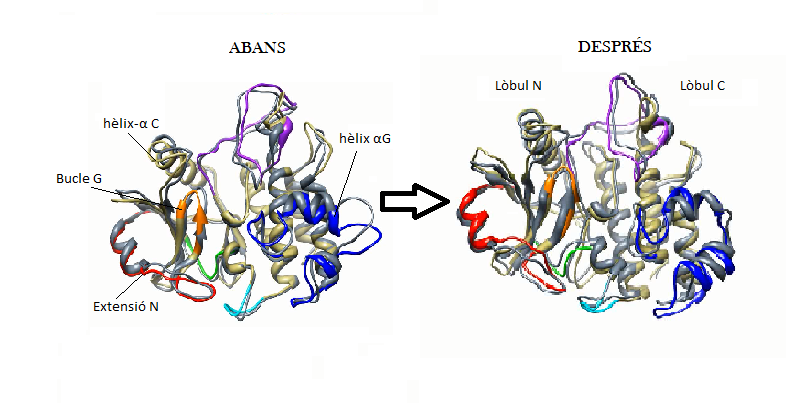 En el canvi de conformació de la IRAK-4, el pot obervar com parts del Lòbul N (la hèlix C i el bucle G) es mouen cap al Lòbul C inactivant així la proteïna.